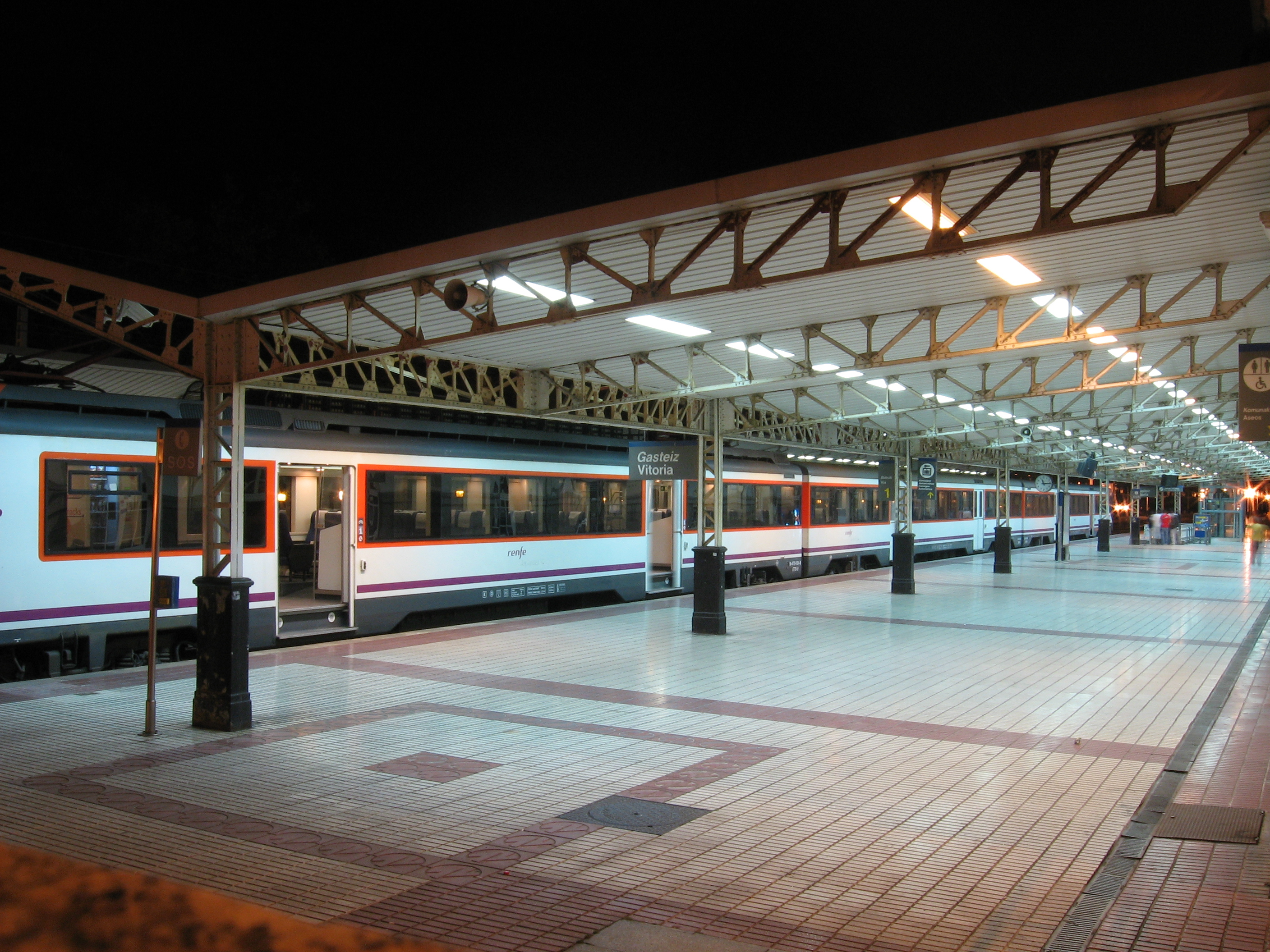 Desc: Estación del ferrocarril en Vitoria-Gasteiz